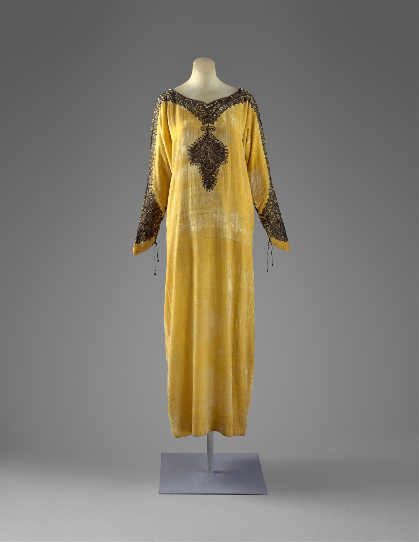 French; Evening dress